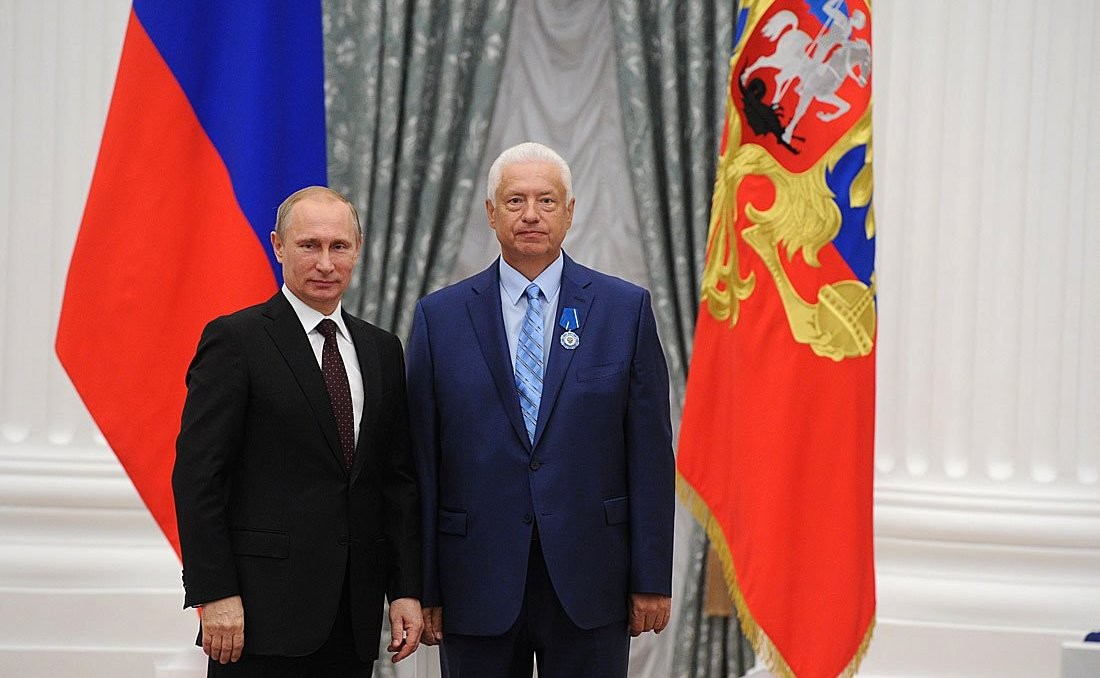 Орденом Почёта награждён депутат Государственной Думы Николай Ковалёв